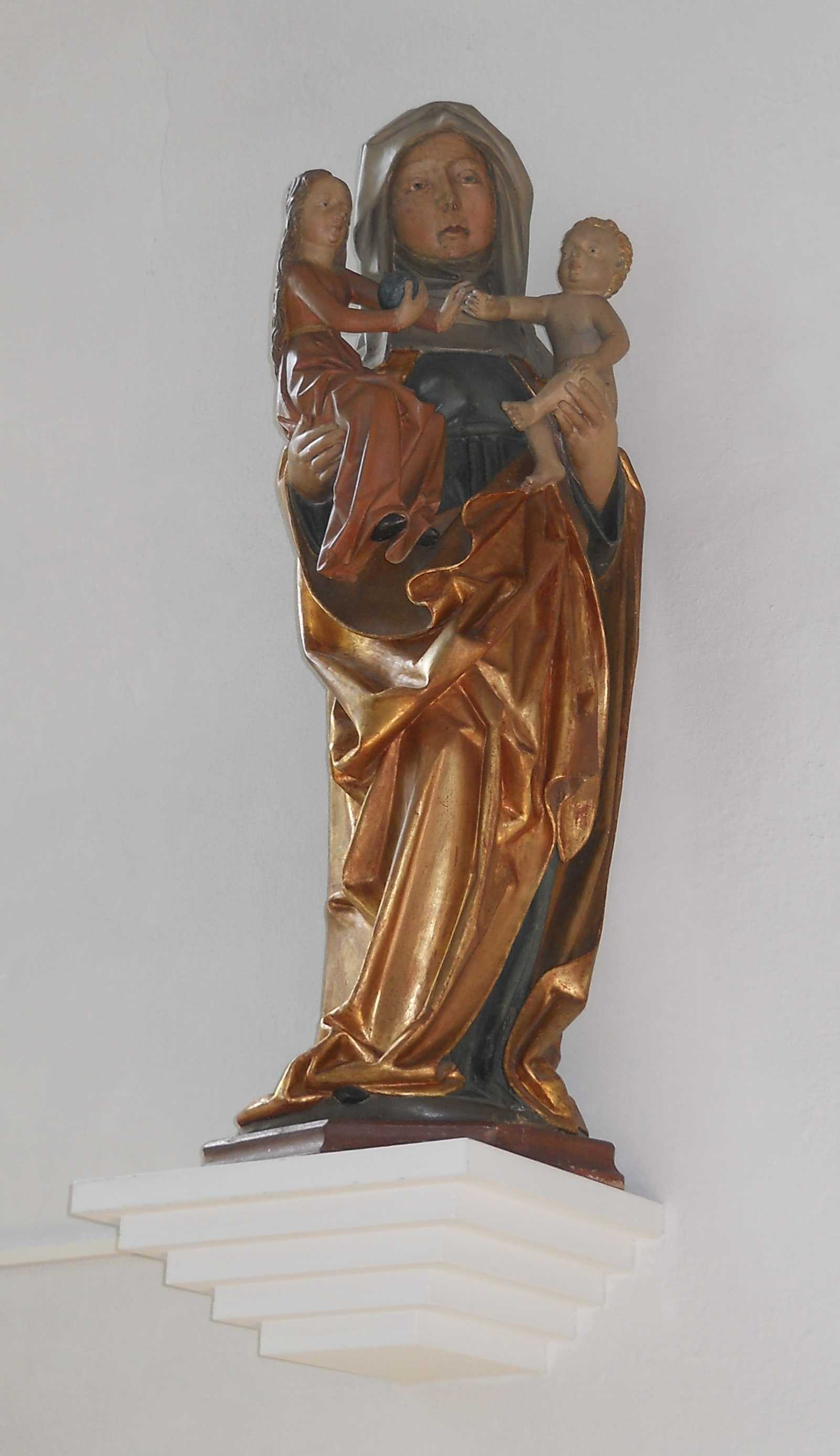 Anna selbdritt-Gruppe (um 1500) in der Pfarrkirche von Rupertsbuch, einem Gemeindeteil von Schernfeld im oberbayerischen Landkreis Eichstätt